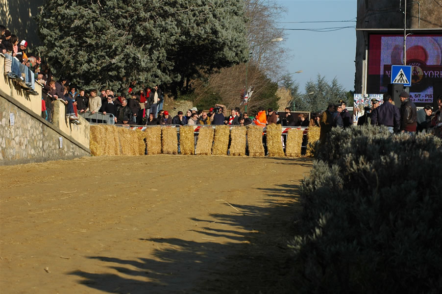 Palio di Buti - partenza al Canape